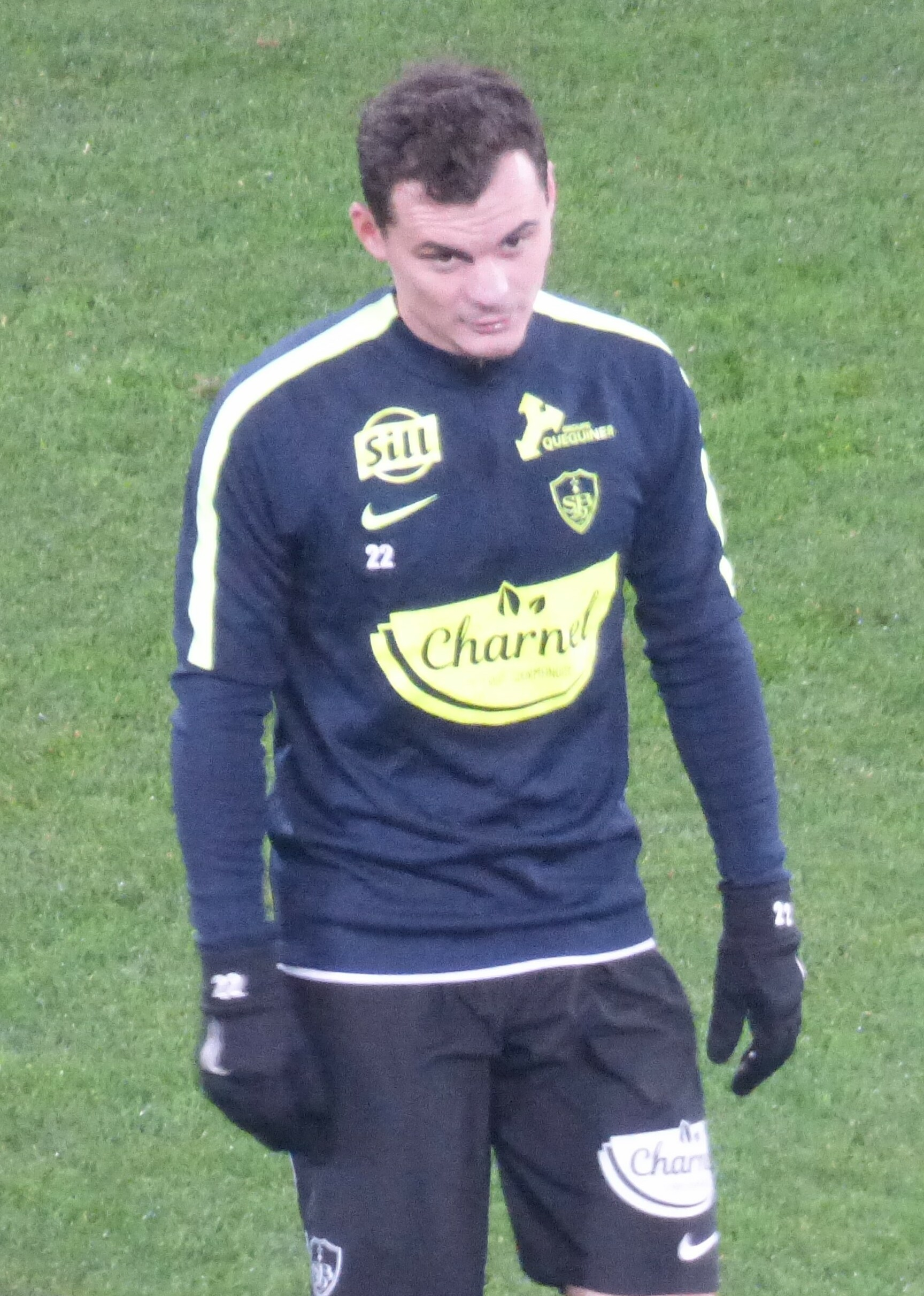 Julien Faussurier avant le match RC Lens / Stade brestois, le 4 décembre 2018, comptant pour la dix-septième journée du championnat de France de football de Ligue 2 2018-2019, au Stade Bollaert-Delelis.